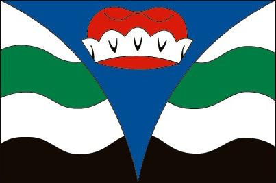 Vápenný Podol vlajka